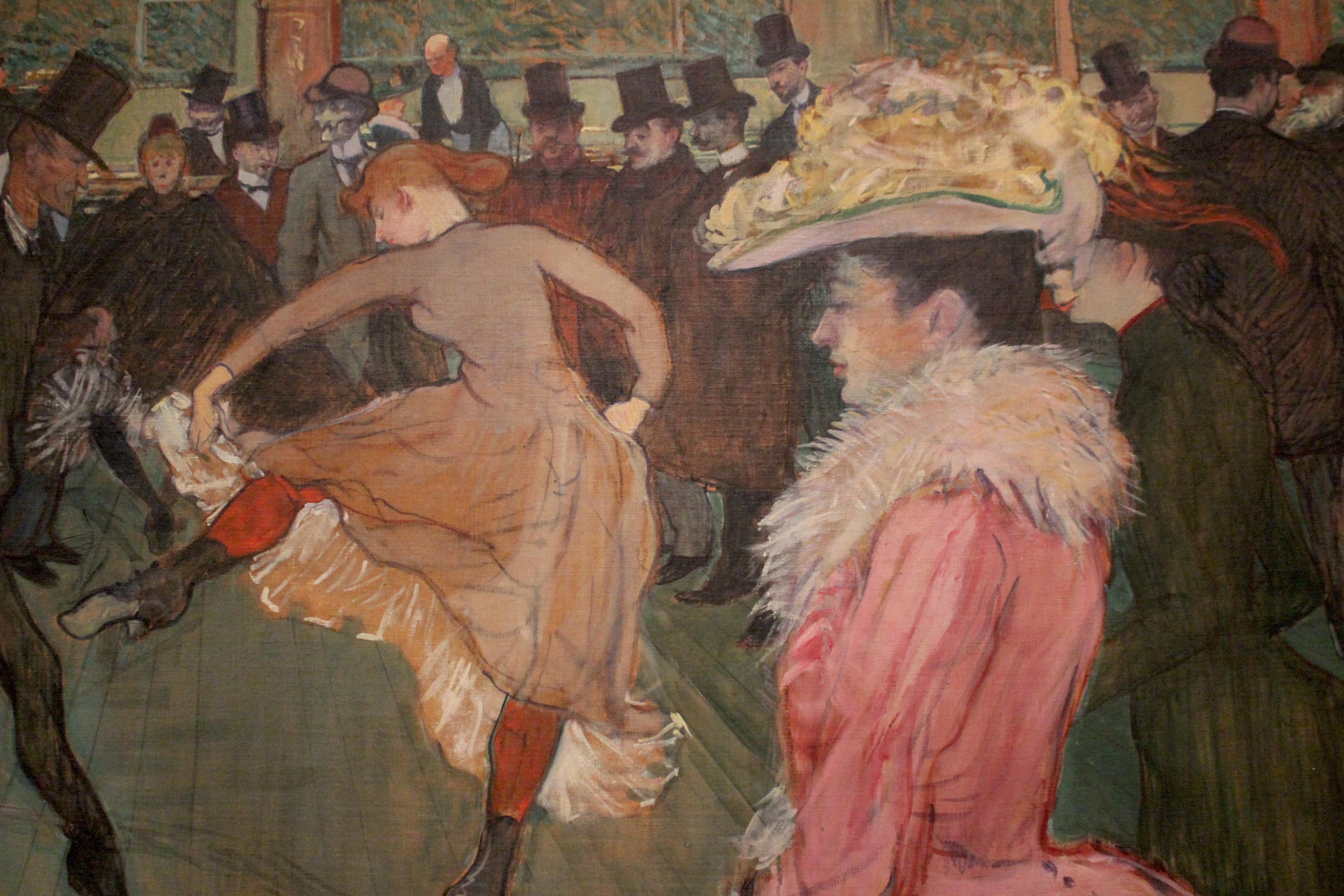 Baile en el Moulin Rouge.